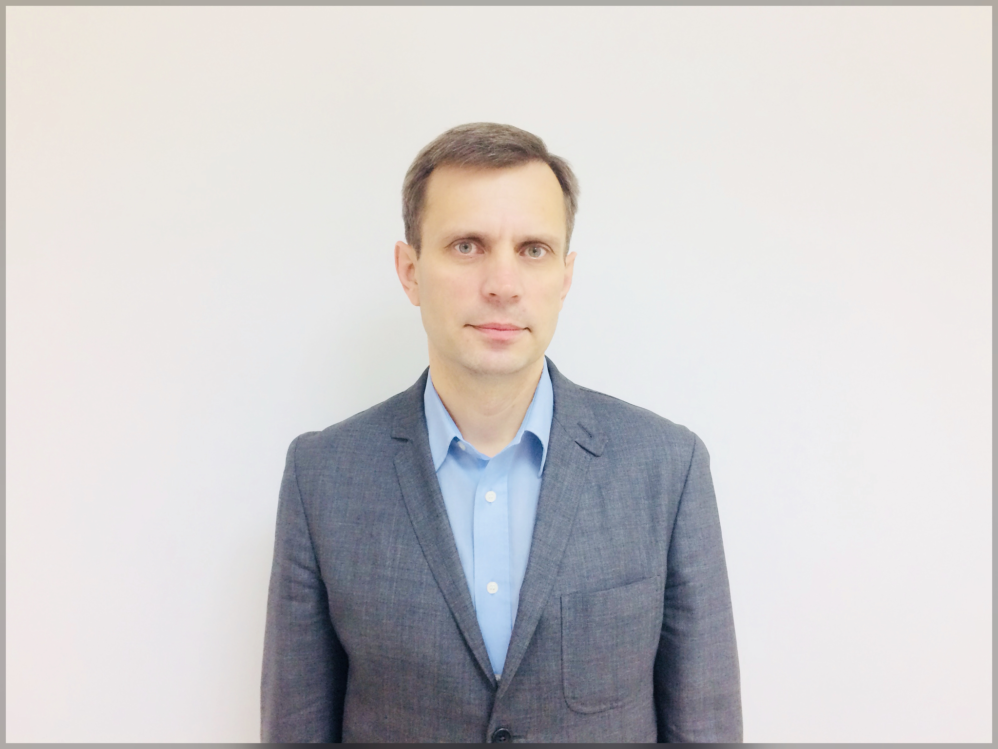 На фото изображён Новосяд Владимир Владимирович